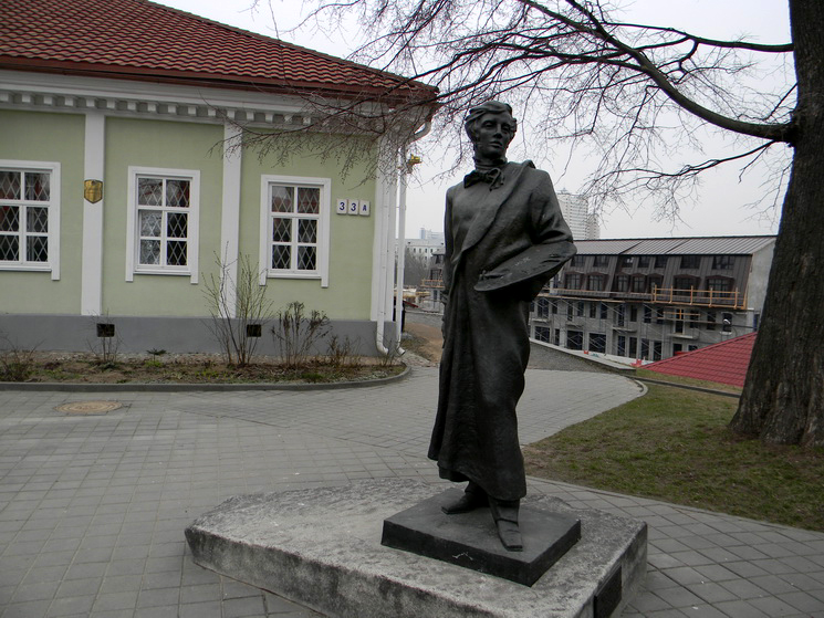 Помнік Ваньковічу. Мінск